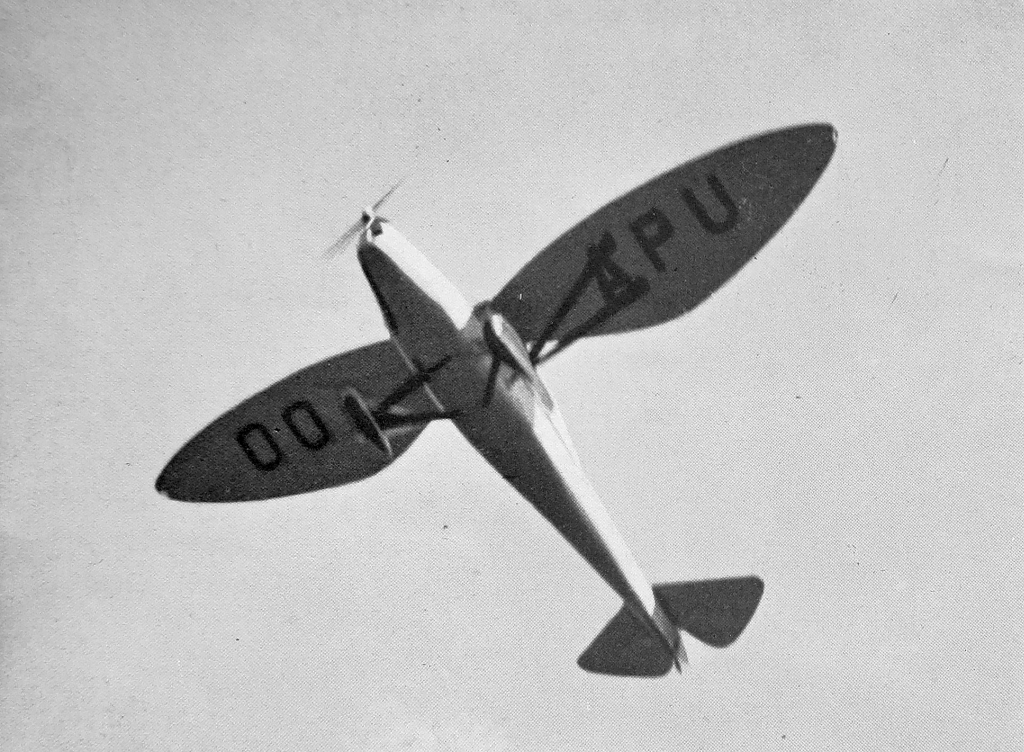 letecký motor Walter Major 4 a letoun SABCA S-20 (1935)